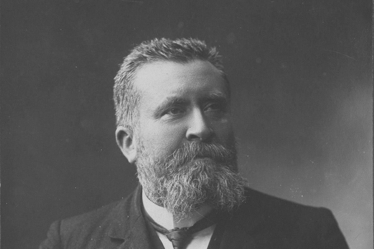 Jean Jaurès, photographie de Henri Manuel, années 1890.